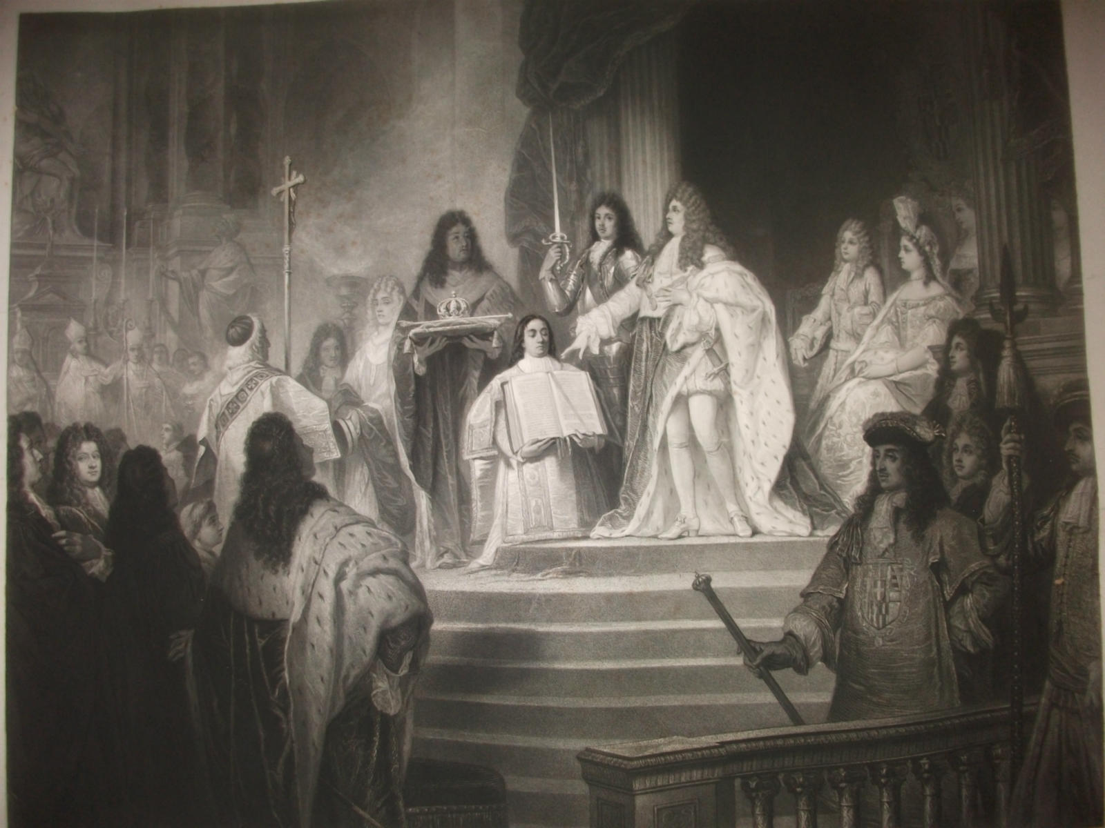 Miniatura dell' Incoronazione di Vittorio Amedeo II di Savoia come Re di Sardegna